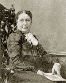 Елън Стоун.